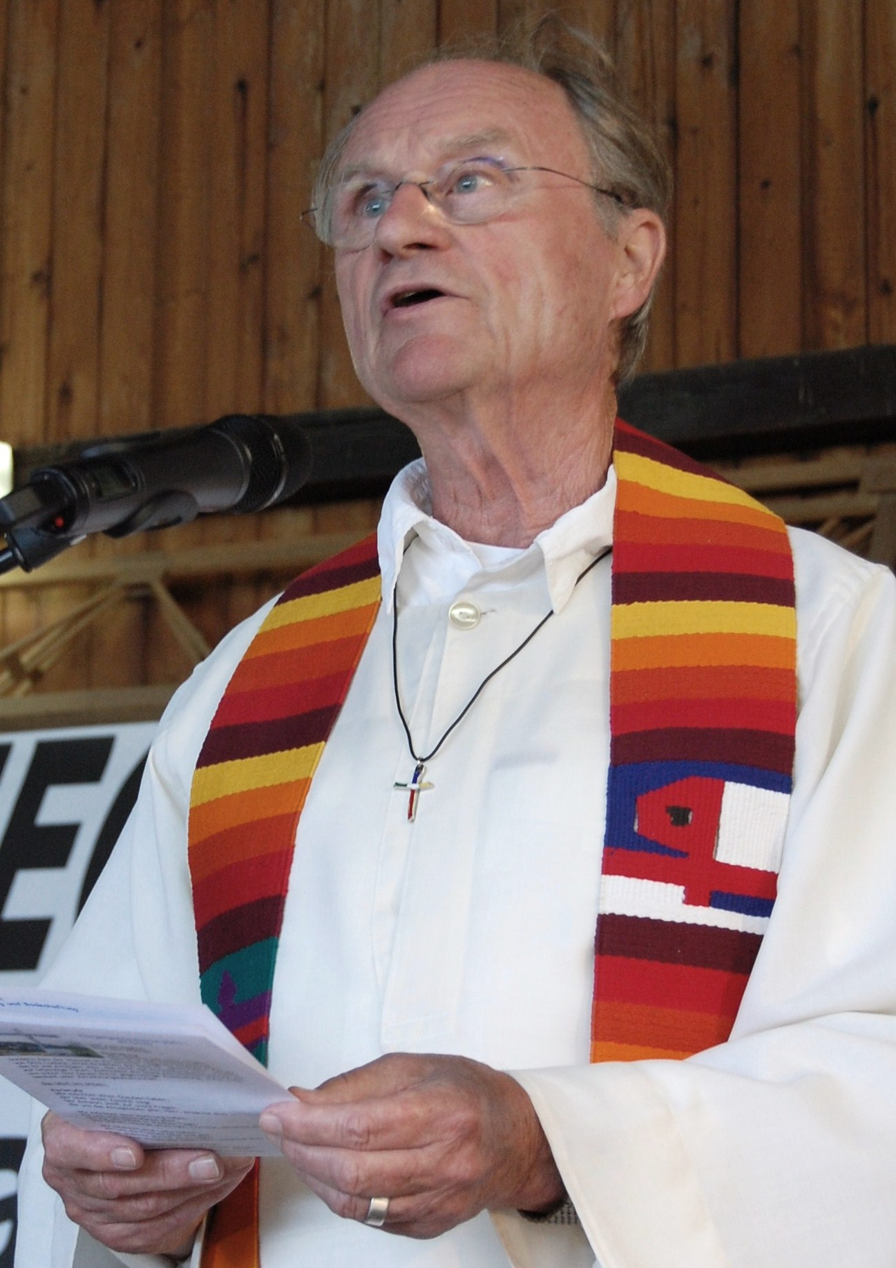 Roland Breitenbach (* 1935), römisch-katholischer Pfarrer und Autor